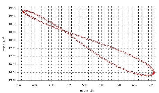 A magyarországi napfelkelték és napnyugták időpontjainak ábrázolása derékszögű koordináta-rendszerben